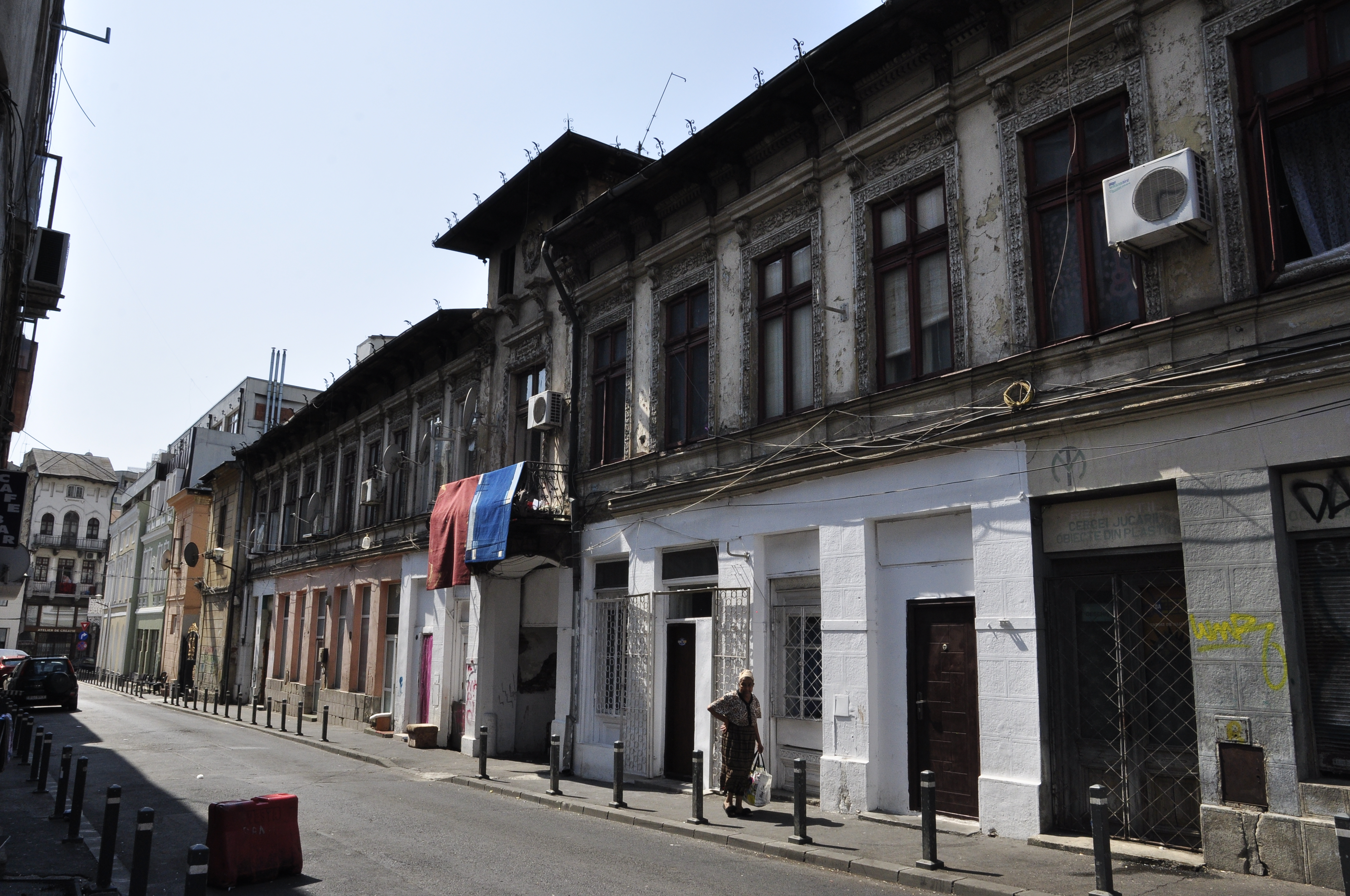 Casă - Strada Baia de Fier 5